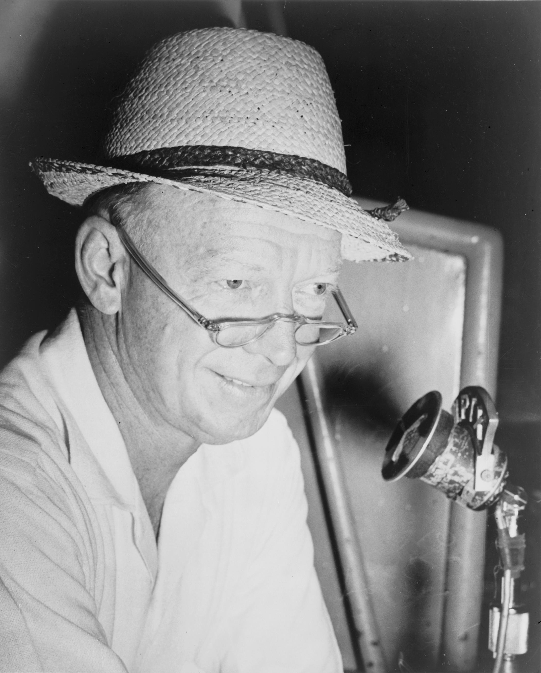 Red Barber, sportscaster